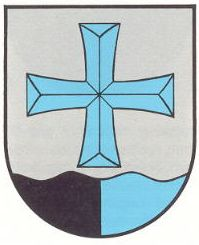 Wappen von Herchweiler